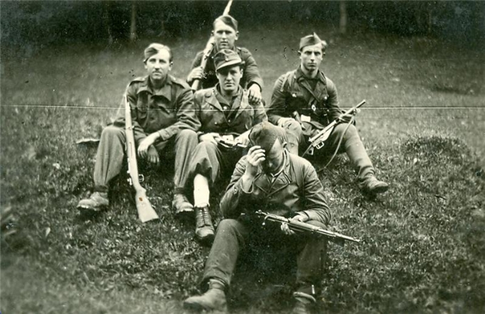 Pripadniki KNOJ-a na Dobravljah.